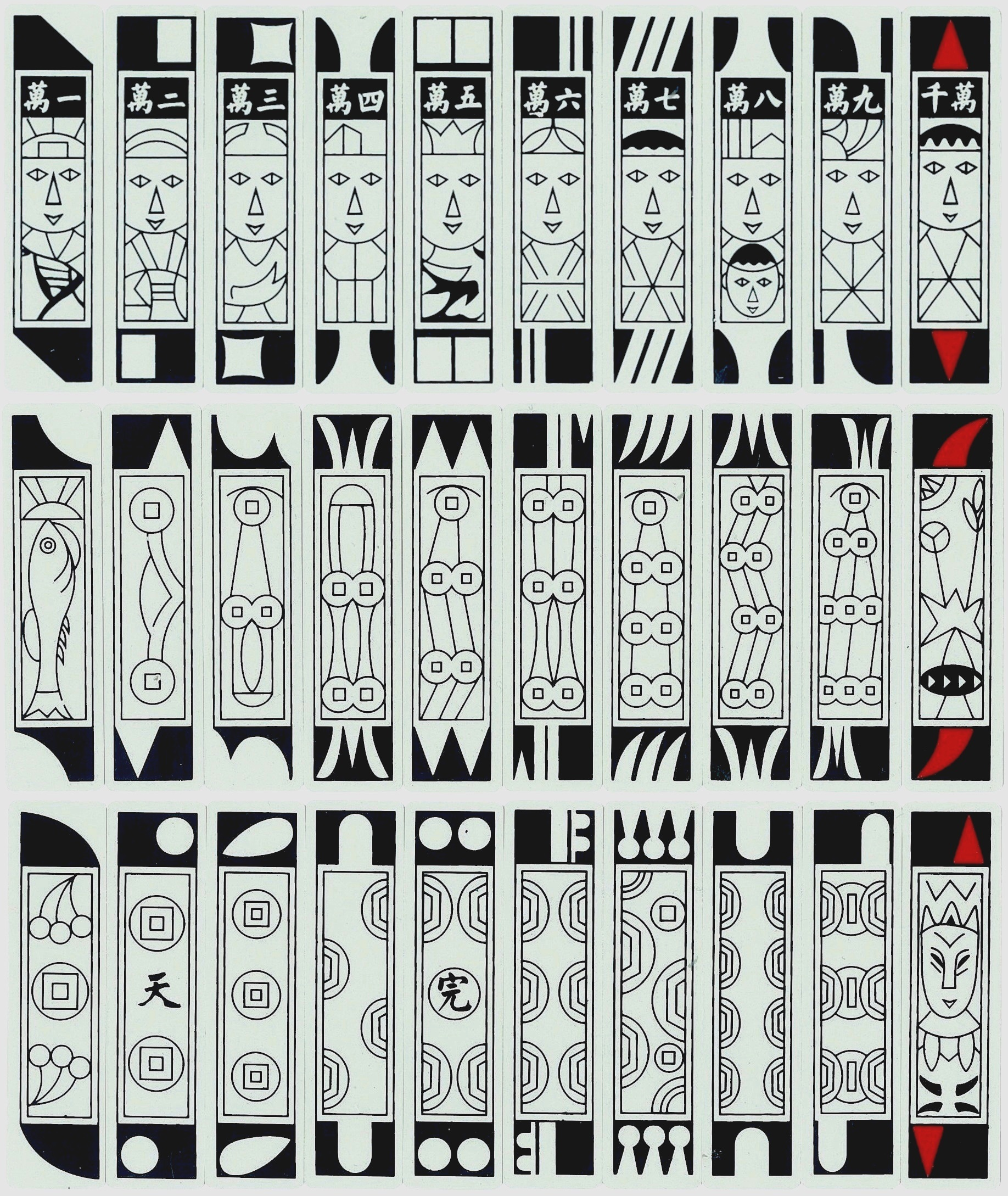 中文（台灣）: 塑料的水滸牌